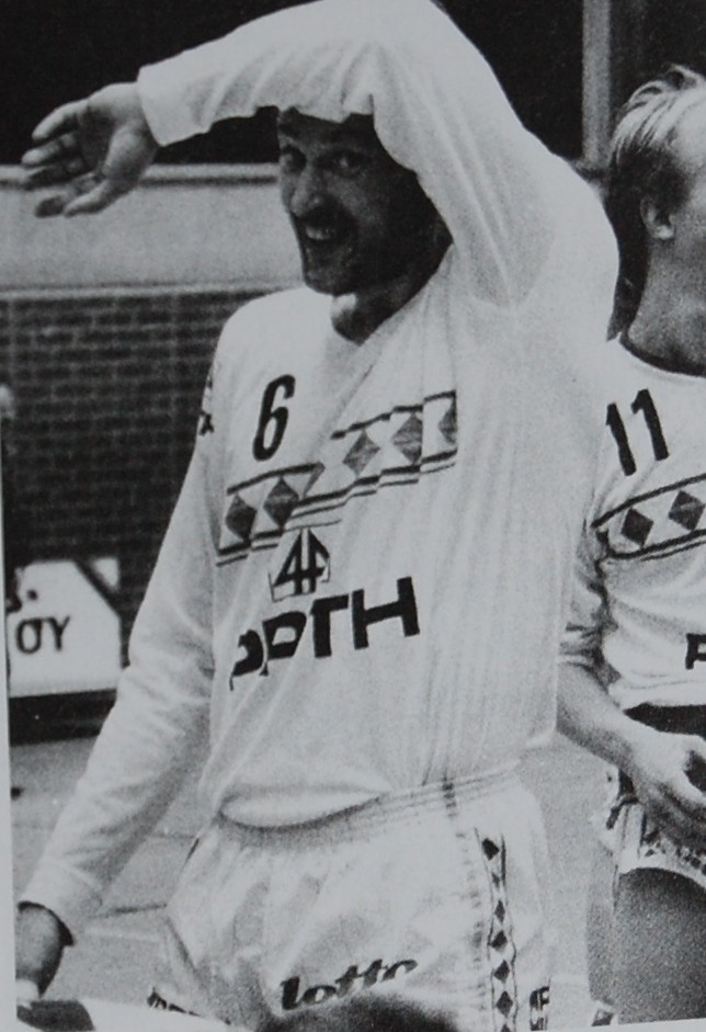 Finland volleyball player Pekka Toppari 1986